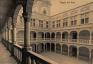 Interior del Claustro San Ignacio en 1925, remodelación hecha por el arquitecto belga Agustín Goovaerts, Medellín, Colombia.